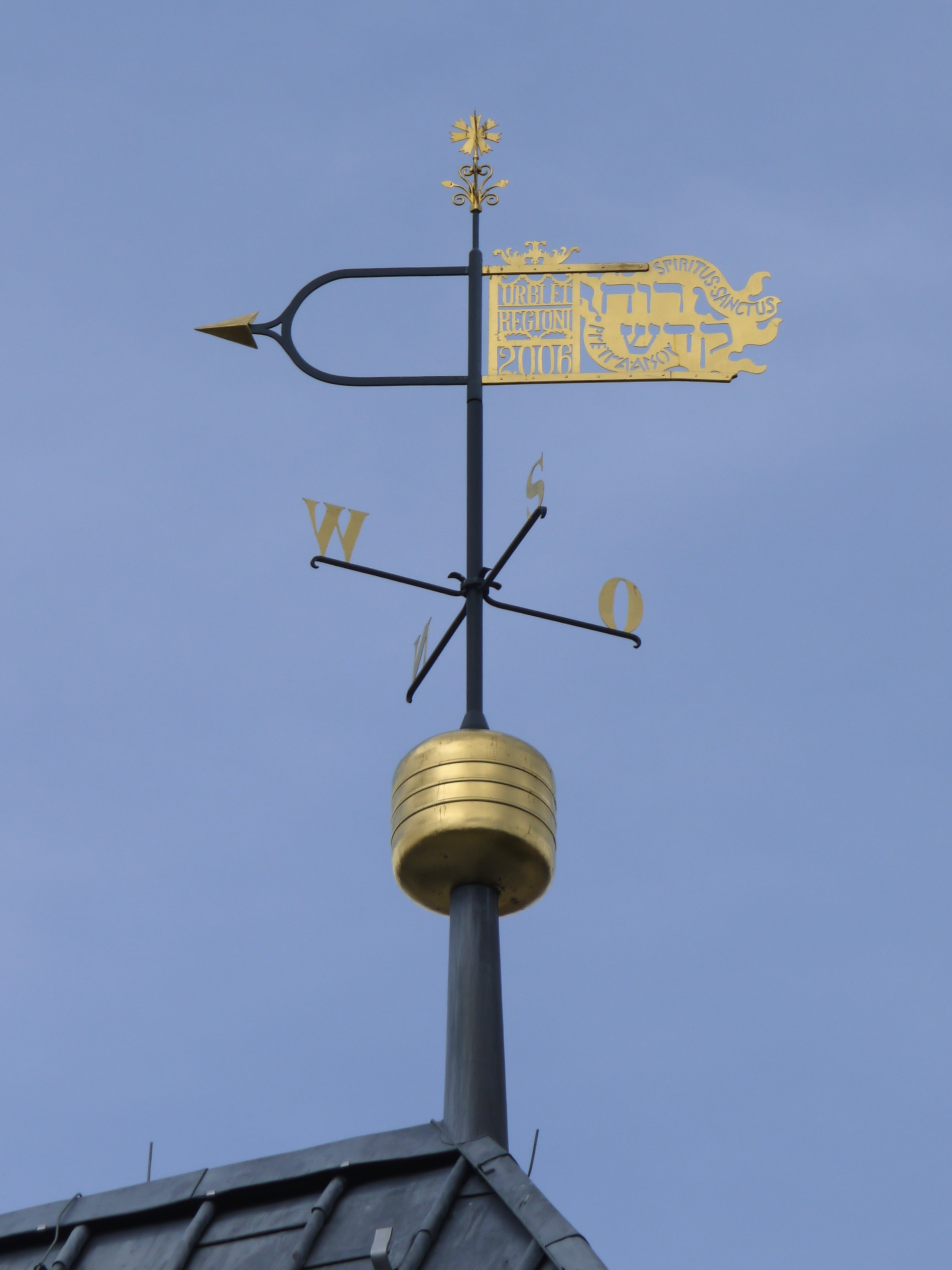 Marktkirche zum Heiligen Geist in Clausthal-Zellerfeld - Wetterfahne am Ostdach (Heiliger Geist)